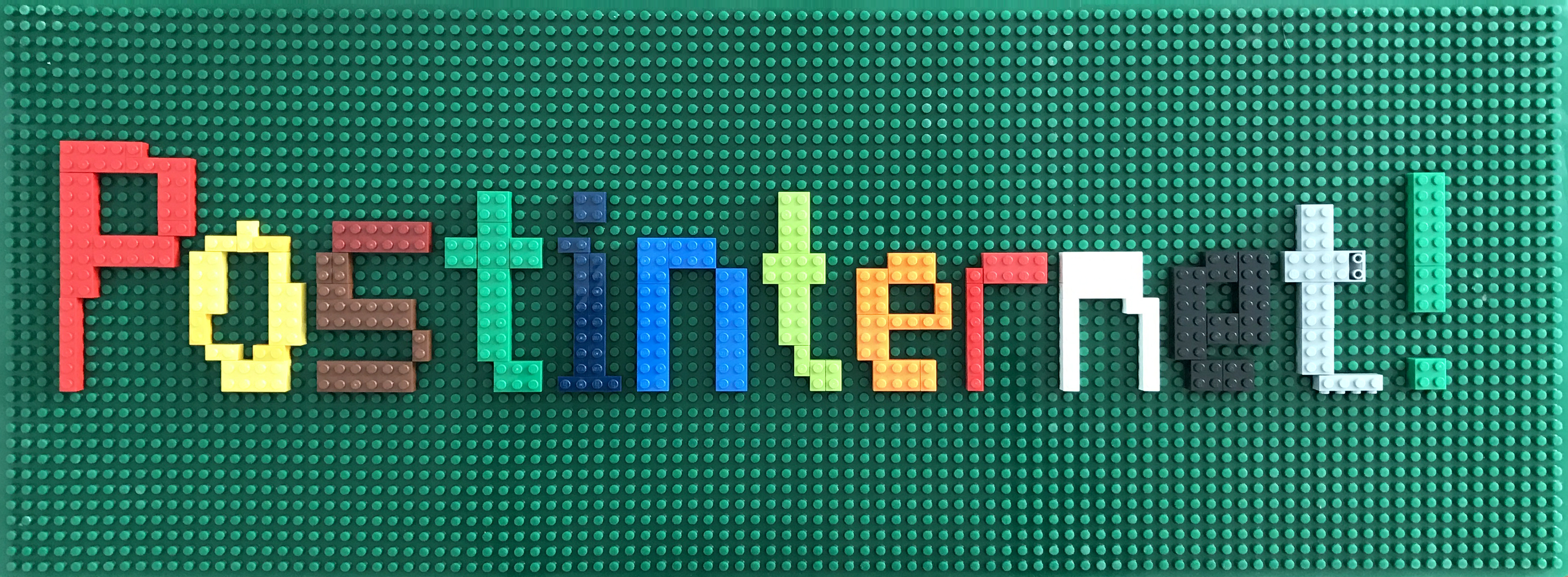 Artwork "Postinternet!", 80 x 30 cm, from Vincent van der Vorst, New York